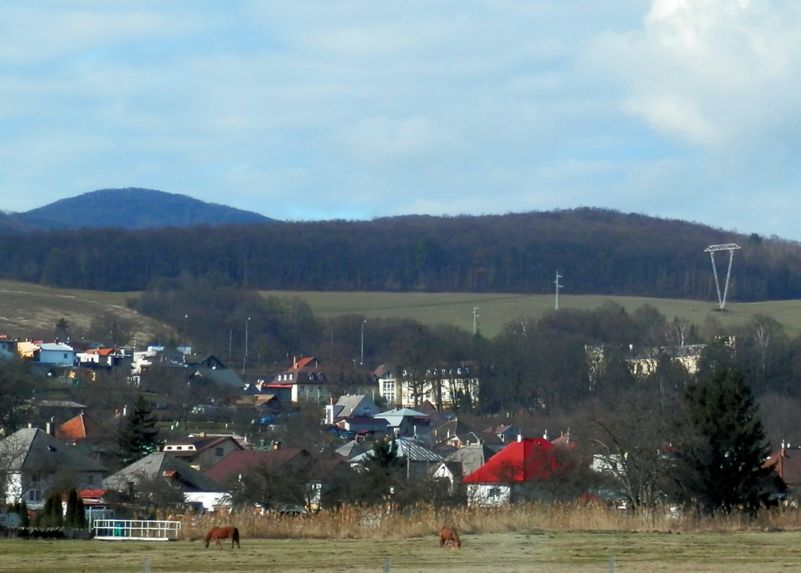 Obec Ličartovce okres Prešov.